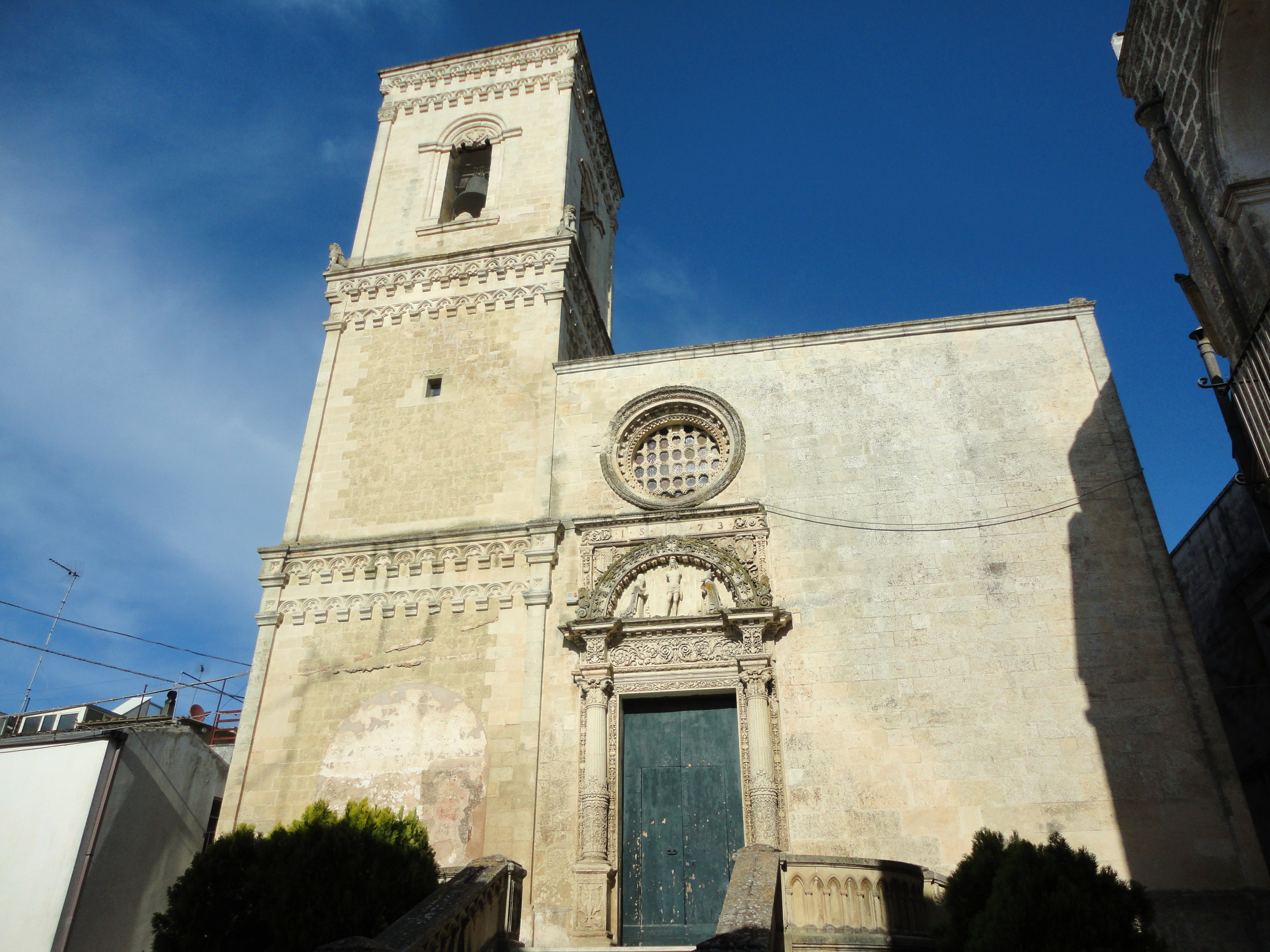 Chiesa Madre di Corigliano d'Otranto, Lecce